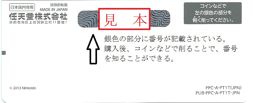 ニンテンドープリペイドカード番号記載部分の見本